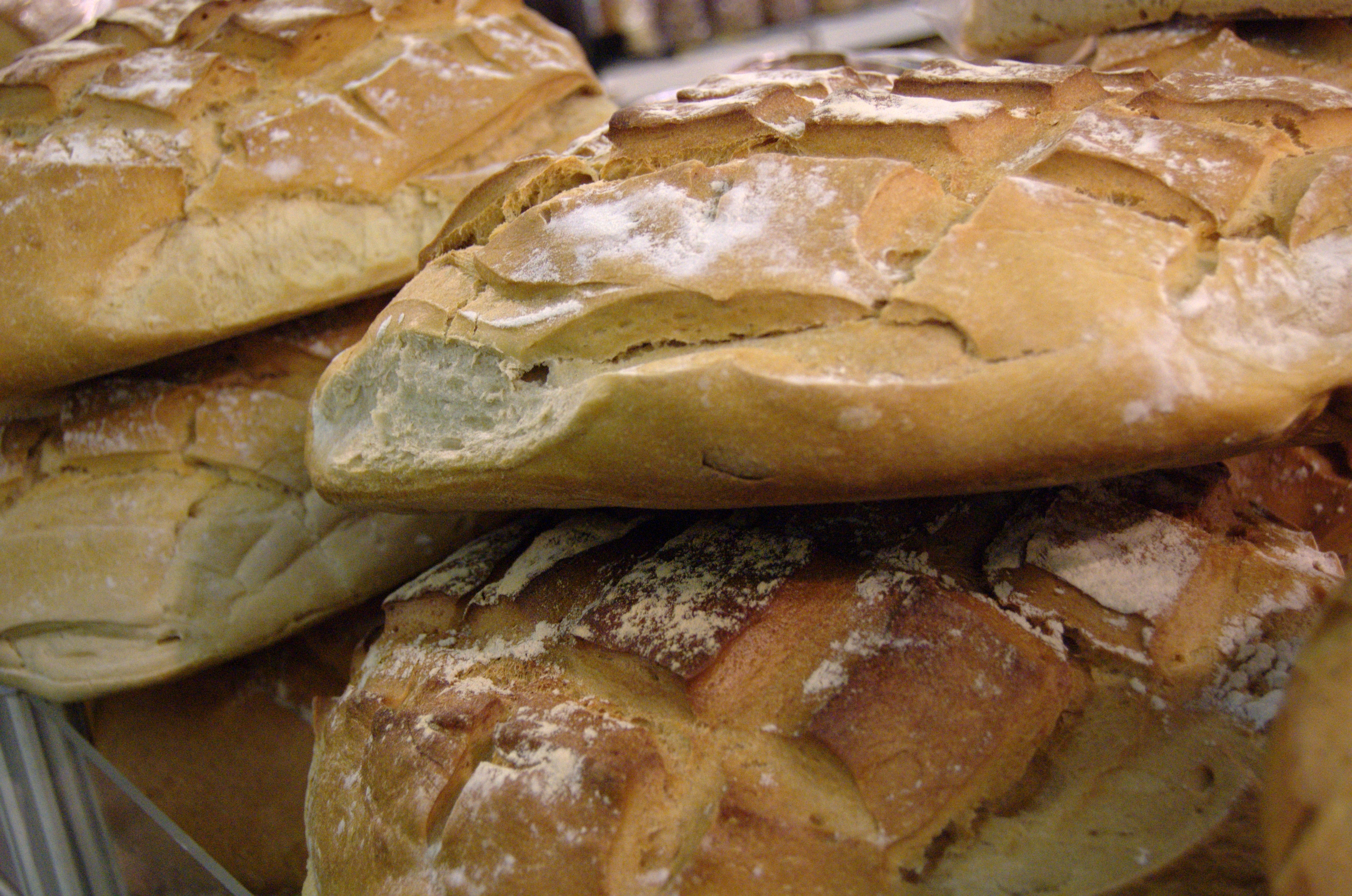 Pains - Salon international de l'agriculture 2009 - Paris - France - 22 février 2009.